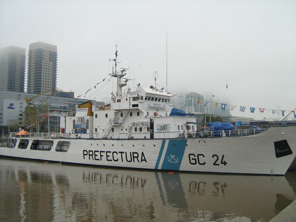 Guardacostas de la Prefectura Naval Argentina GC24 Mantilla, Buenos Aires.